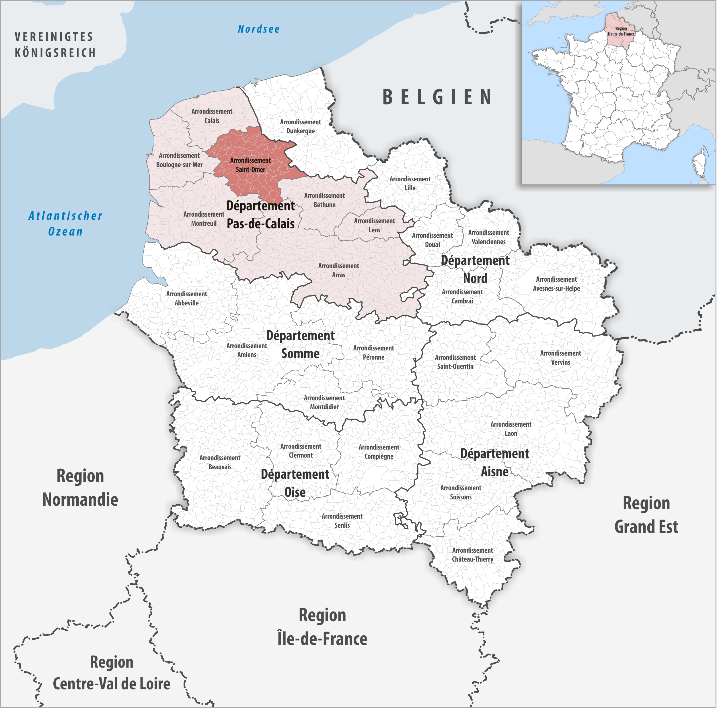 Lage des Arrondissements Saint-Omer